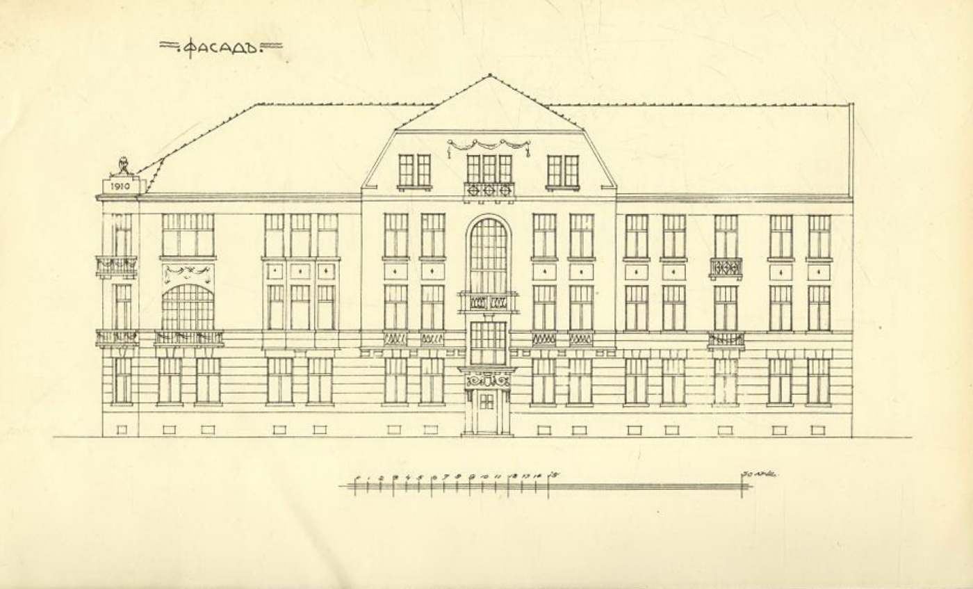 Праект на пабудову Дома Абрампольскага ў Менску.